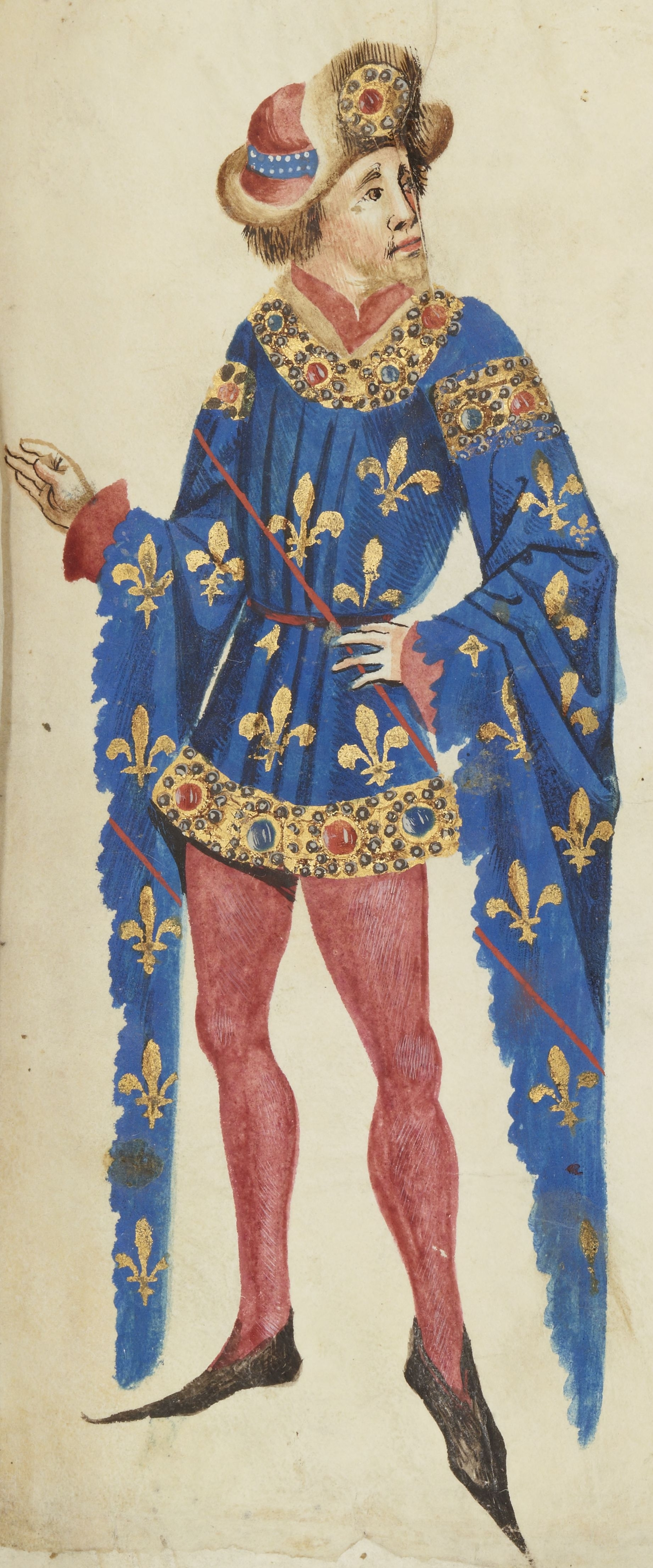 Jean Ier, 4e duc de Bourbon : Guillaume Revel, Armorial d'Auvergne f 17r